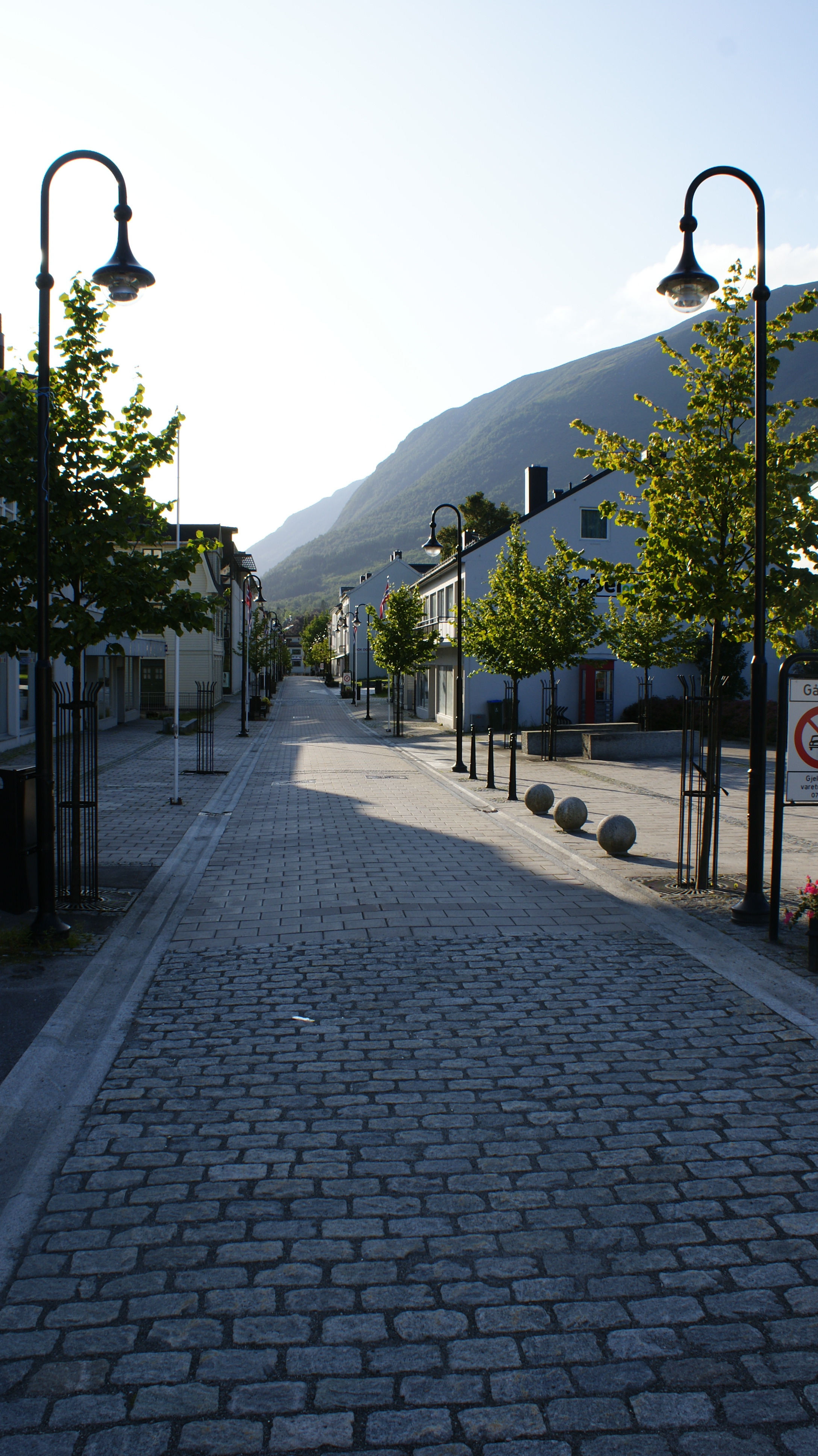 Ørsta, Sunnmøre, Møre og Romsdal, Norway. Centrum.